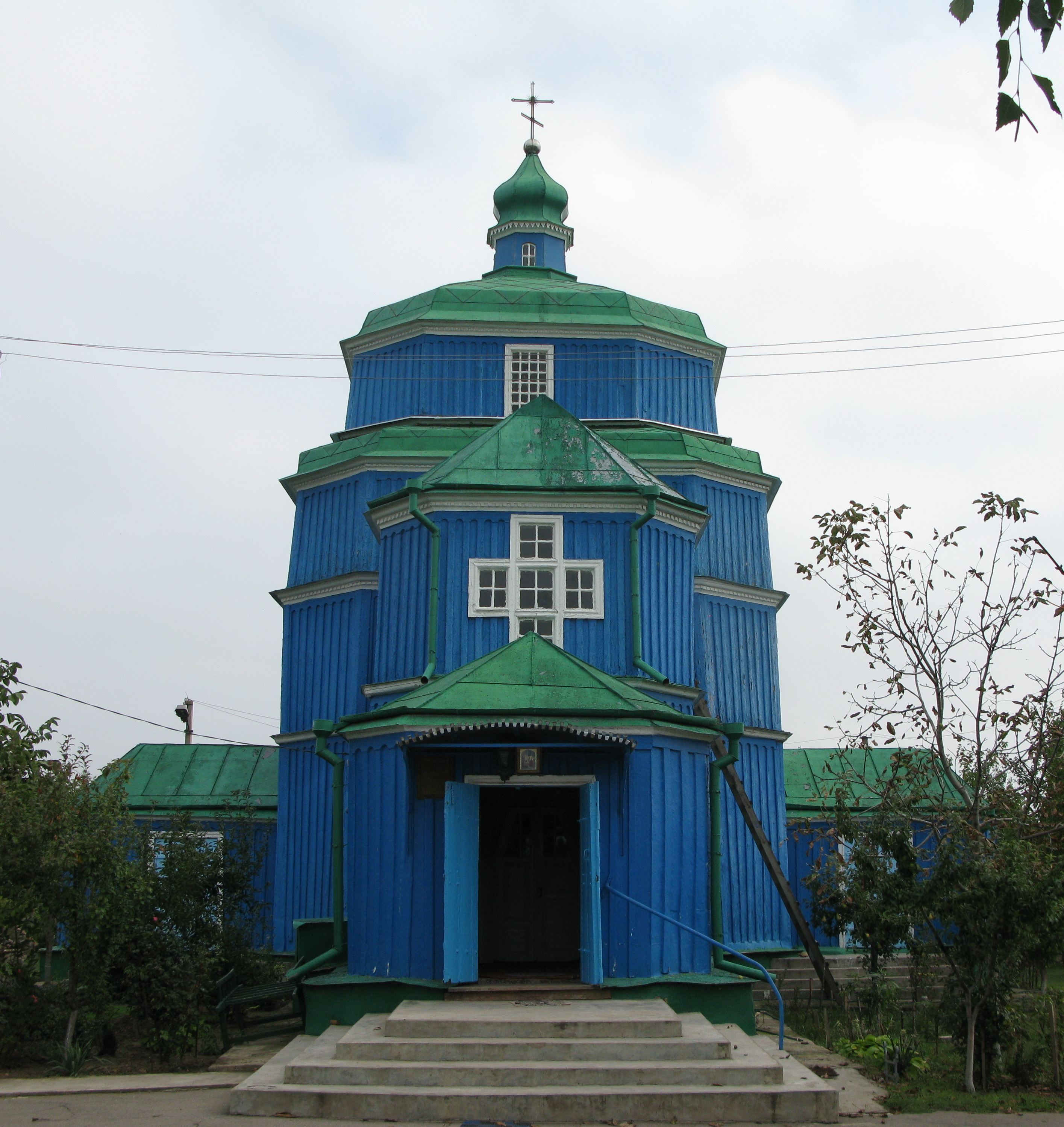 Введенська церква (мур.), Берислав, вул.Садова